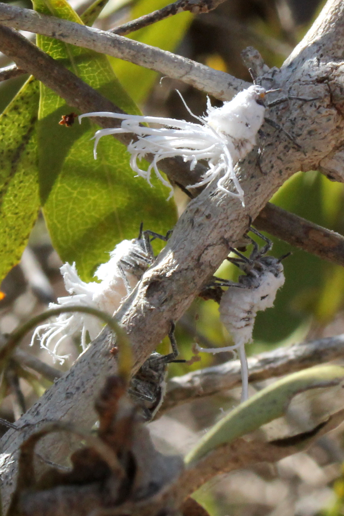 Phromnia rosea in Reniala